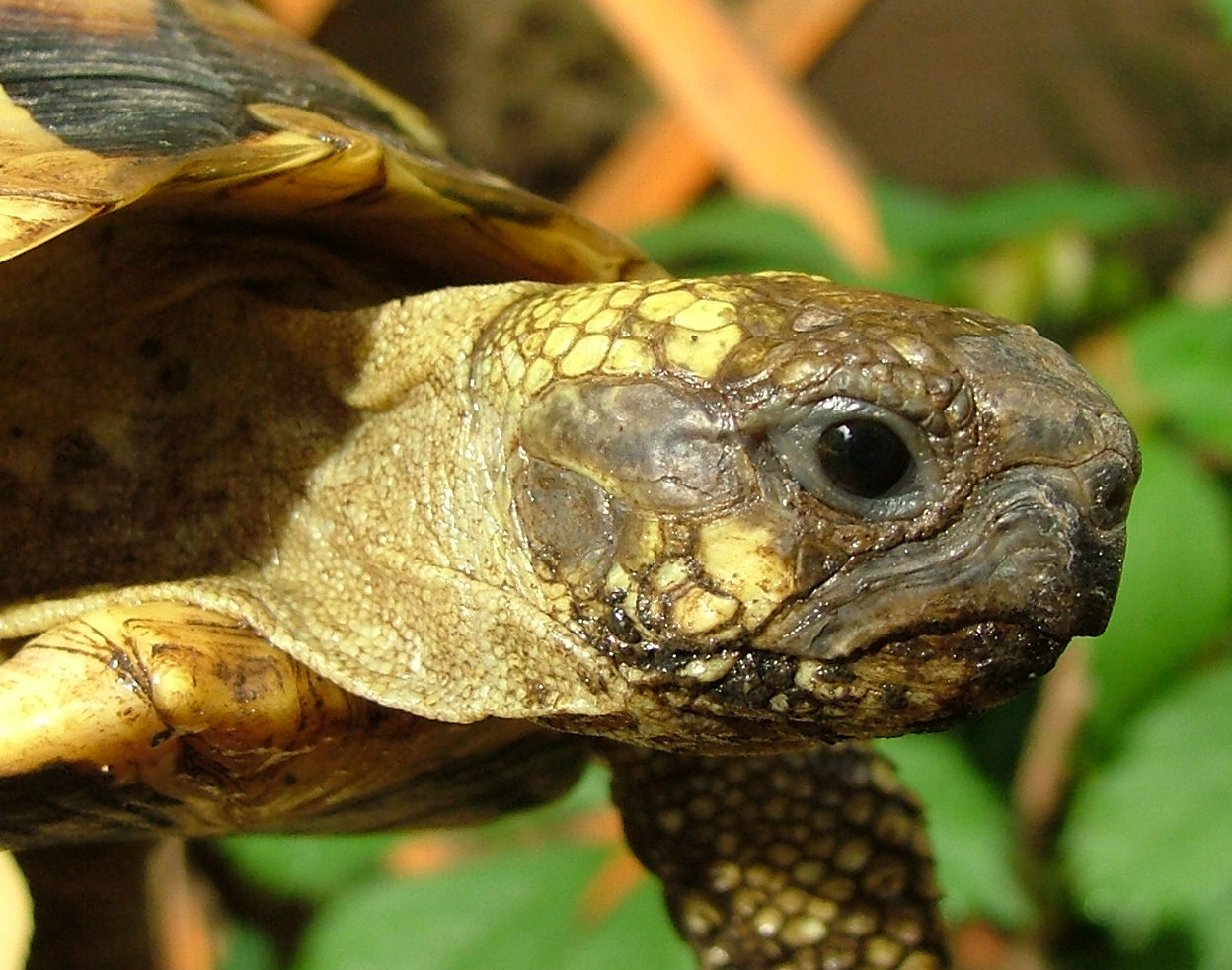 Testudo hermanni hermanni Foto capo